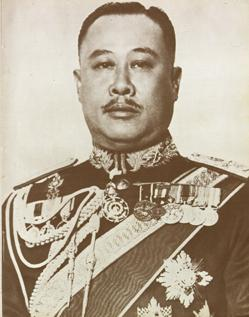 จอมพลประภาส จารุเสถียร